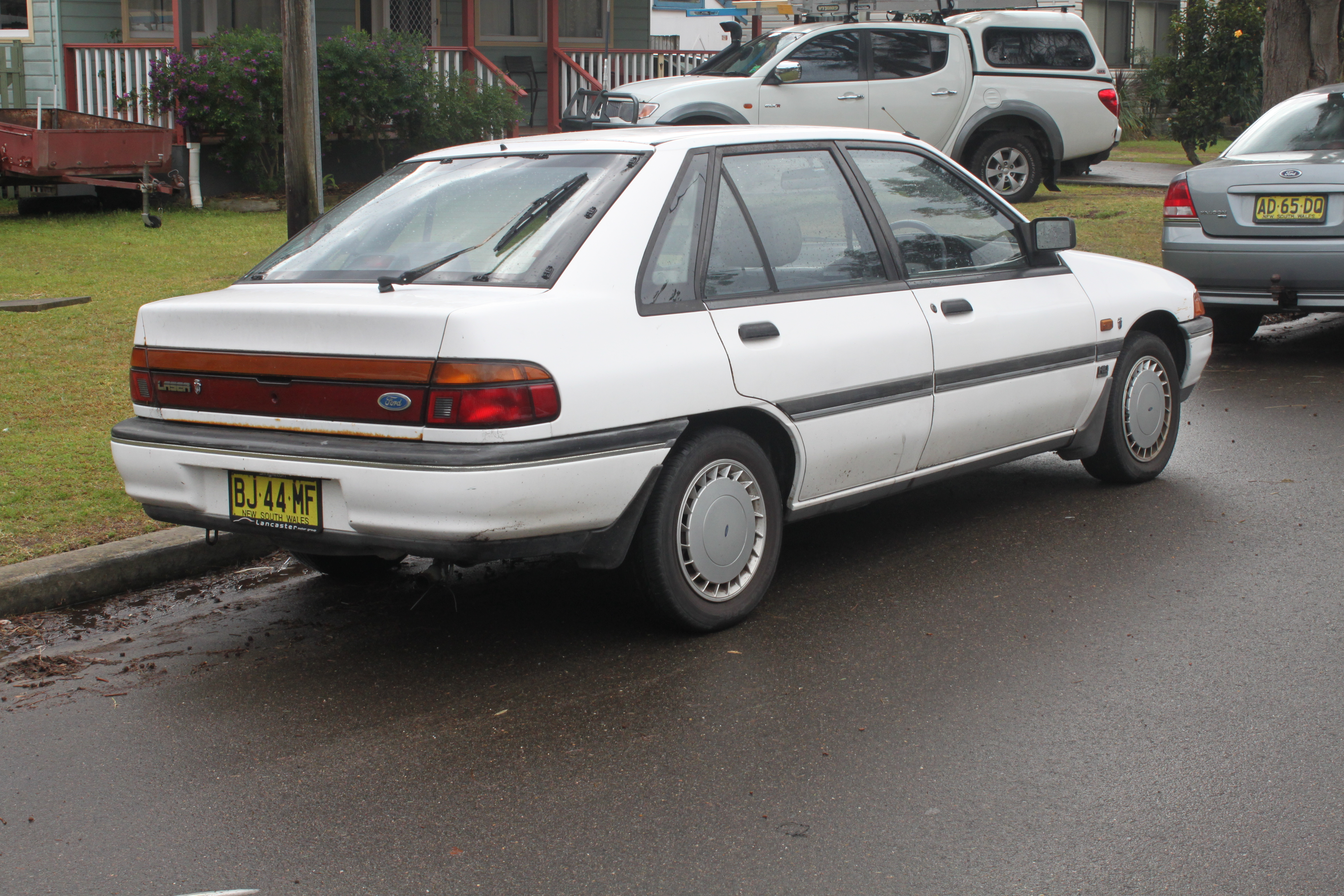 Ford Laser KF Ghia